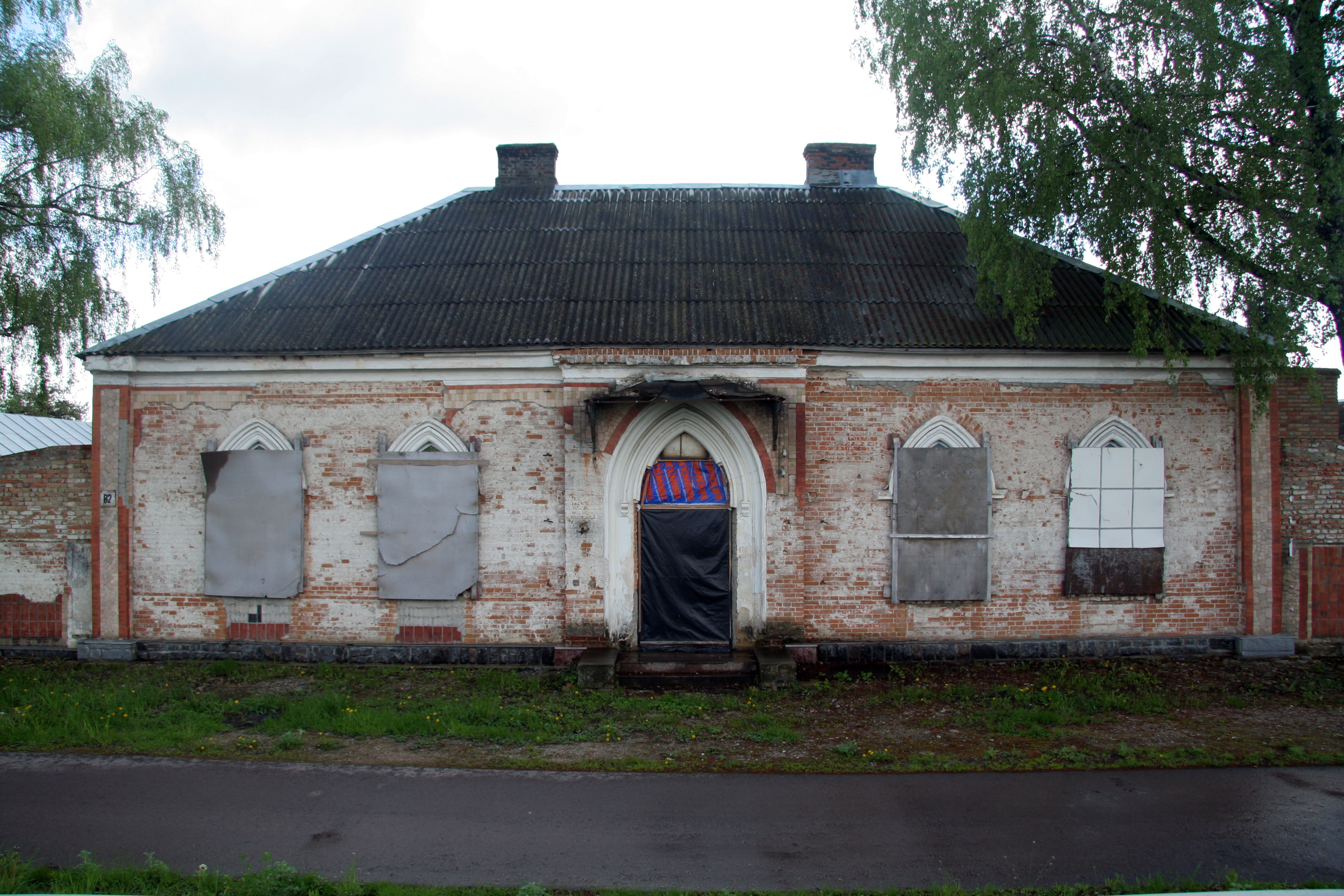 Поштова станція у с.Антопіль 315км Е40